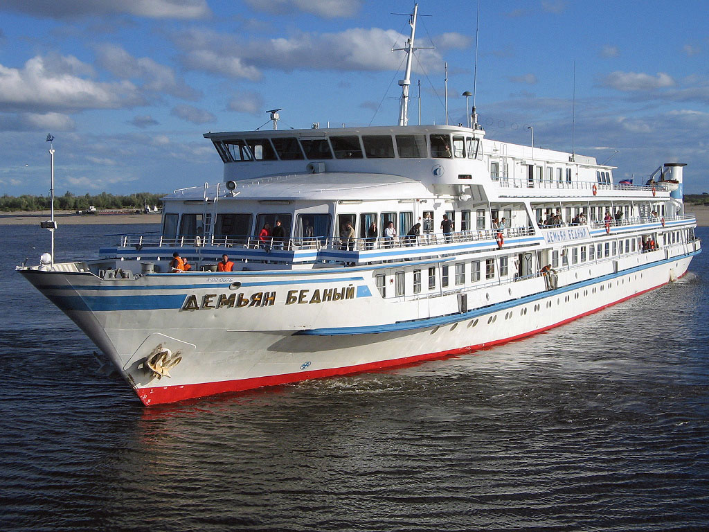 Речное круизное судно Демьян Бедный (проект Q-065) подходит к причалу